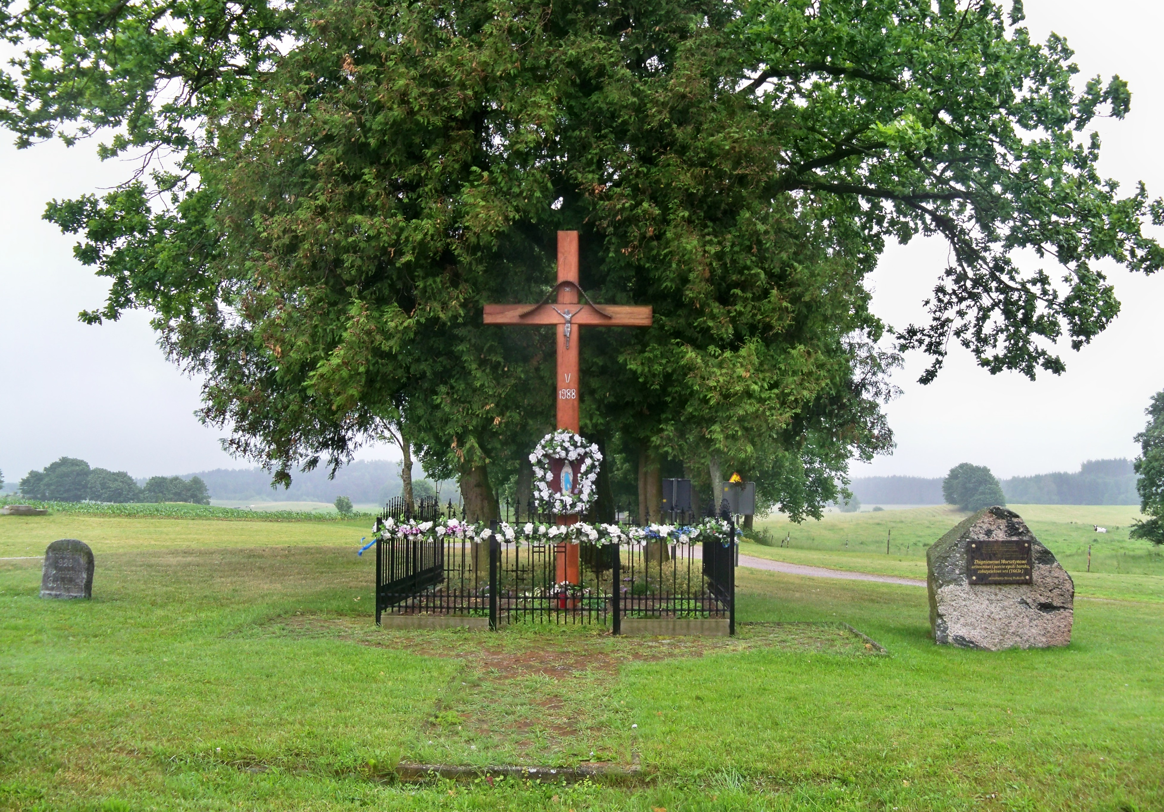 Stara Rudówka, skrzyżowanie głównej ulic wsi z drogą do Szymonki.